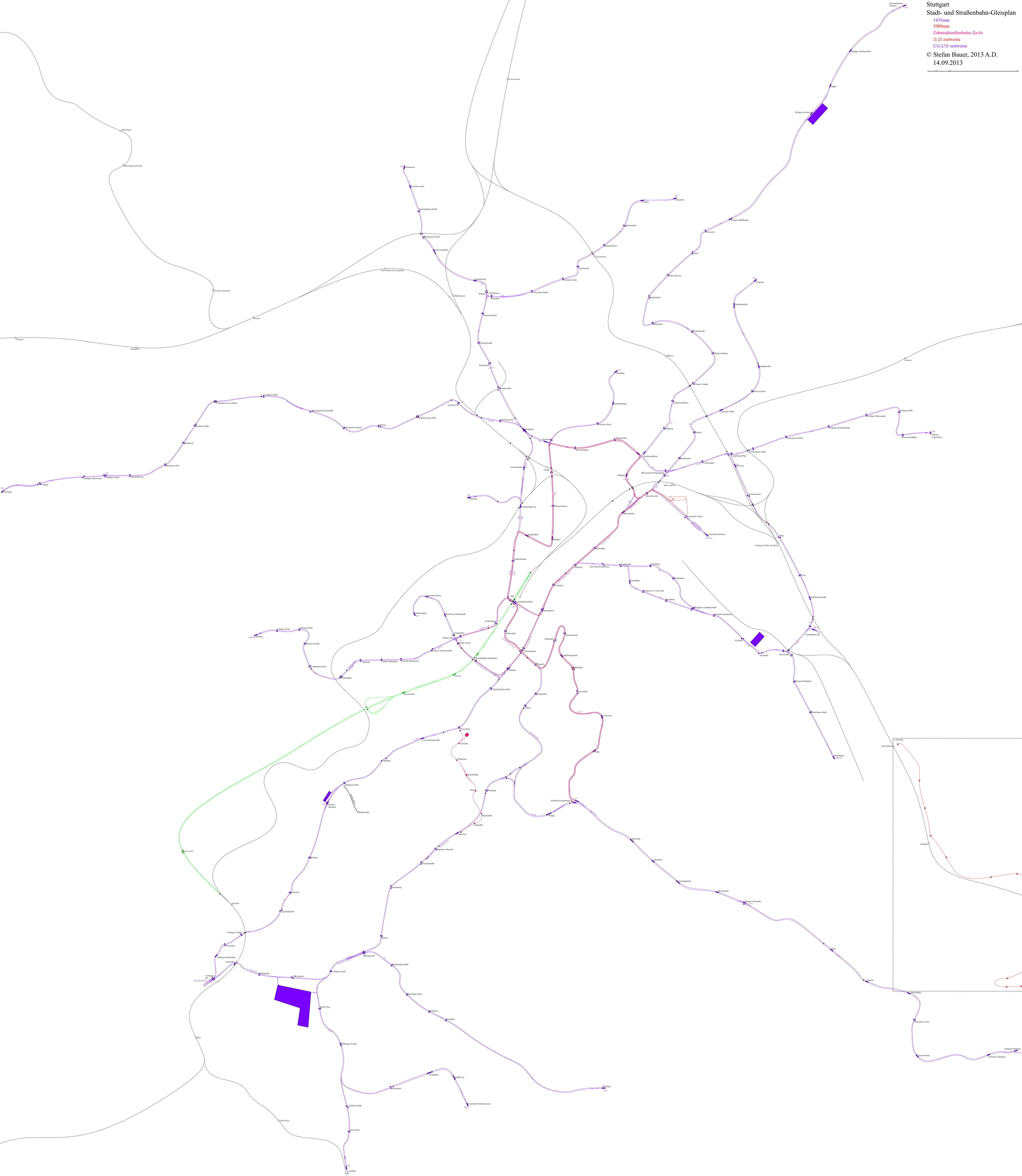 Stadt- und Straßenbahn-Gleisplan Stuttgart 2013